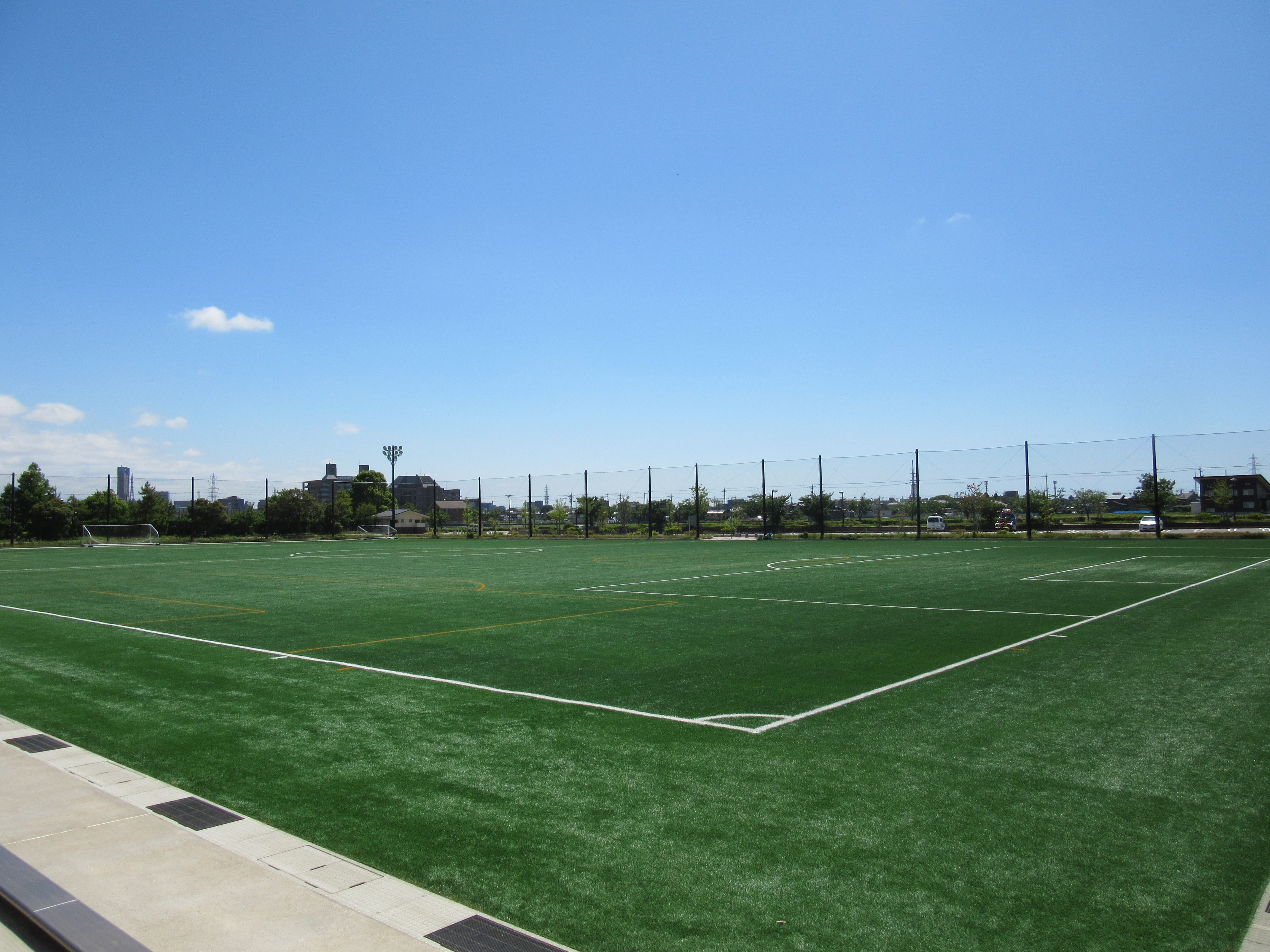 金沢市民サッカー場